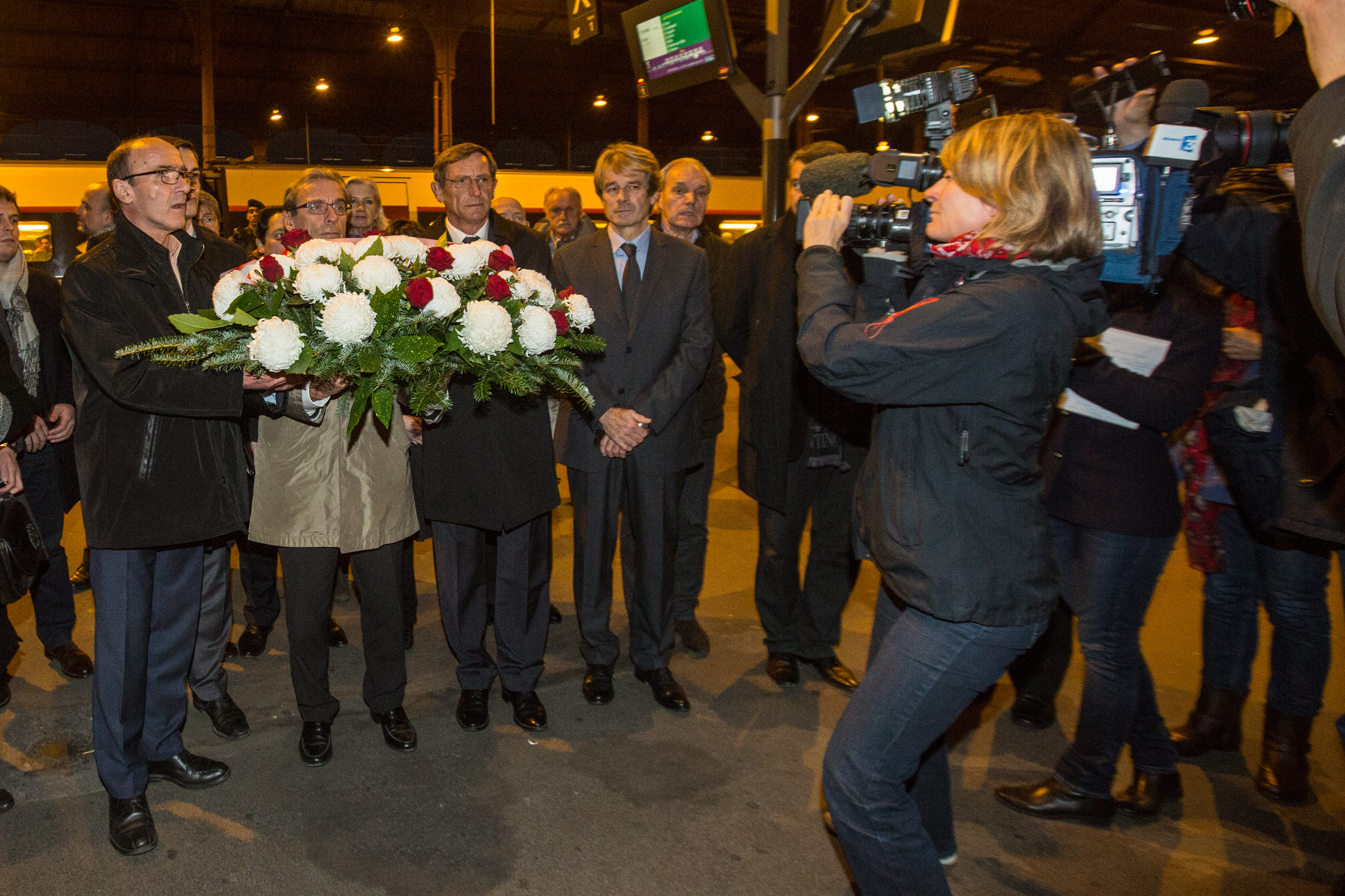 Cérémonie d’hommage aux victimes de l’accident du TGV à Eckwersheim le 14 novembre 2015. De gauche à droite : Jacques Mazars, directeur régional SNCF, Roland Ries, maire de Strasbourg, Robert Herrmann, président de l'Eurométropole de Strasbourg. Gare de Strasbourg 16 novembre 2015.